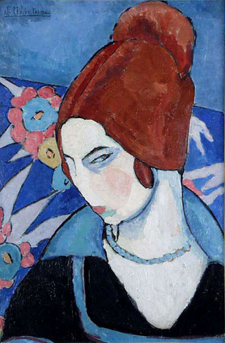 Autoportrait